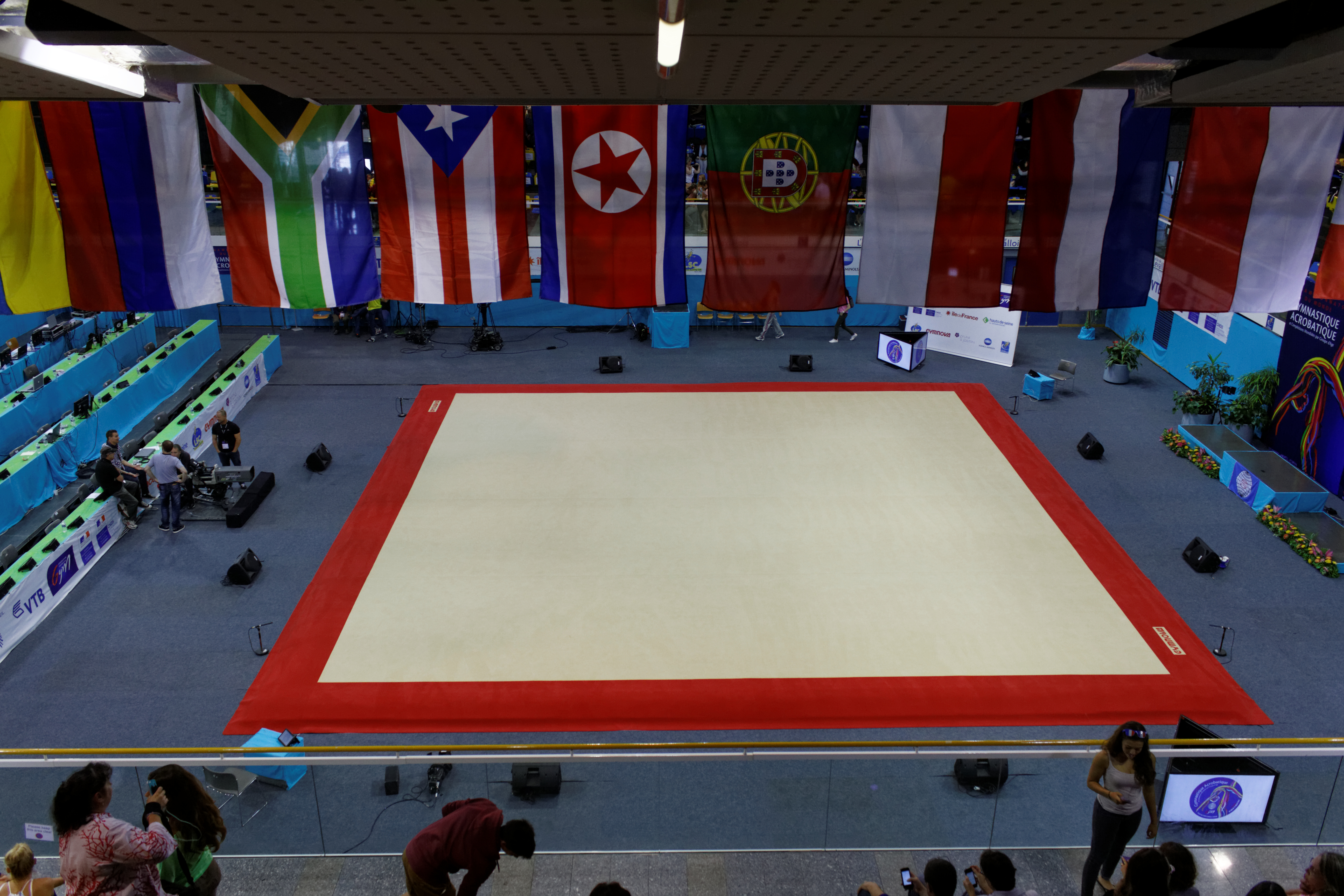 Palais des Sports Marcel-Cerdan